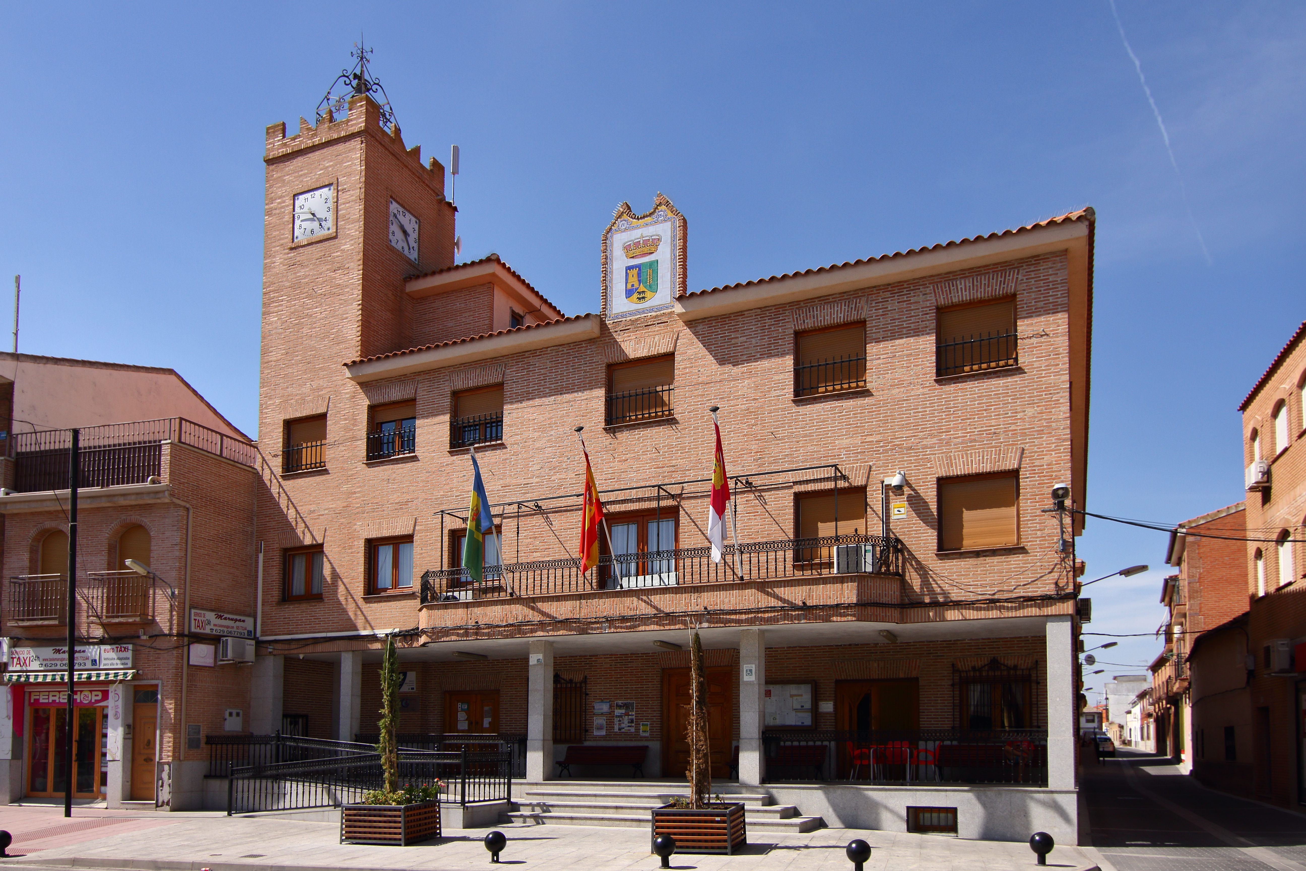 Gerindote, Ayuntamiento